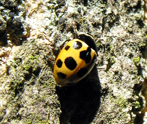 Dilgėlinė boružė (Hippodamia (Semiadalia) notata (Laicharting 1781)) Šeima. Boružės (Coccinellidae) Fotografavo: Algirdas, 2006 m. liepos 24 d., Lietuva.